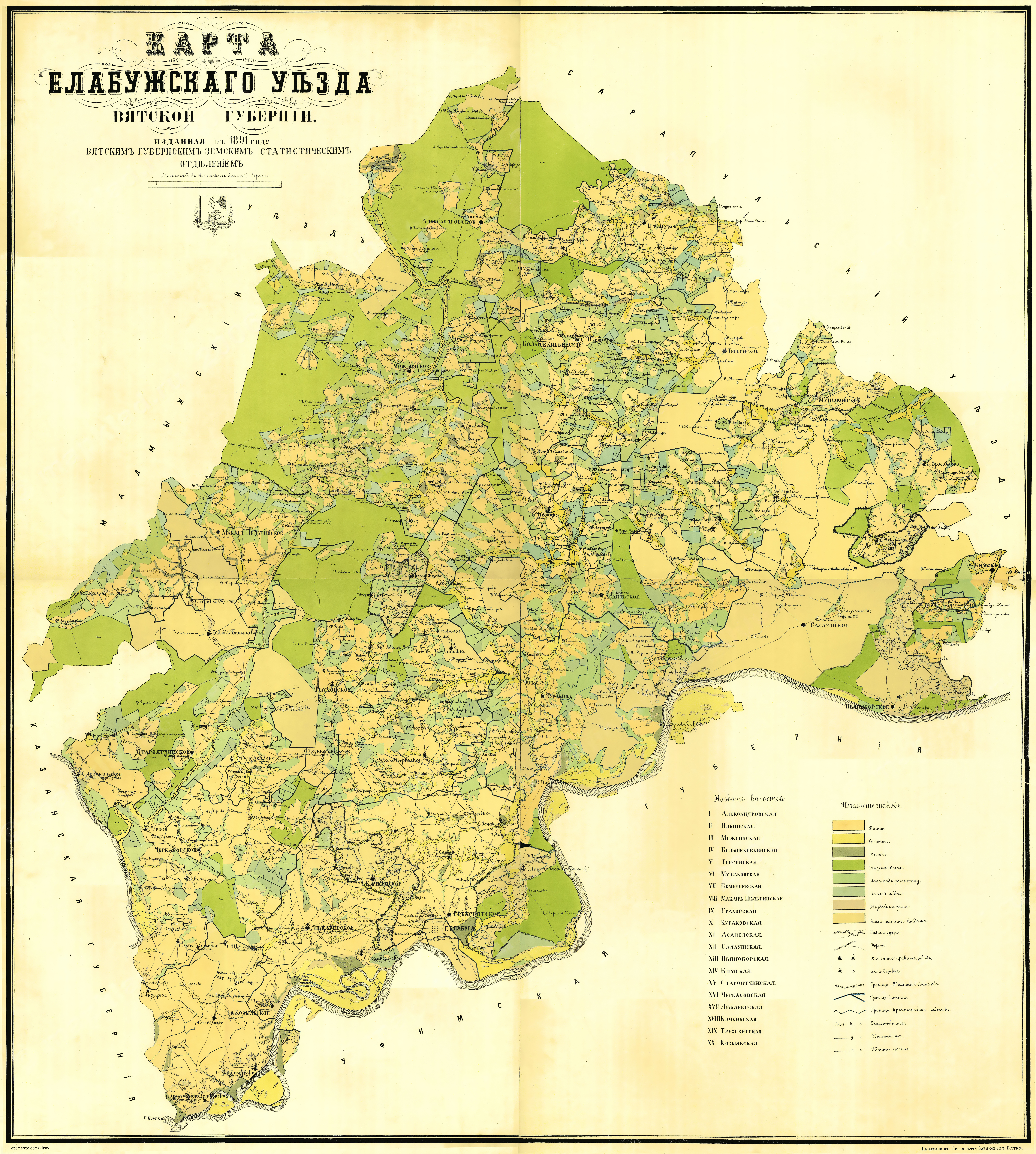 Карта Елабужского уезда 1891 года